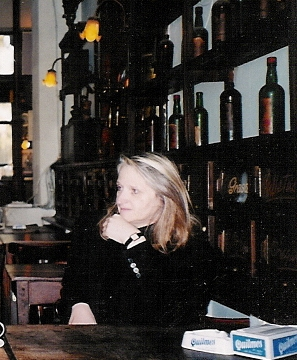 Die argentinische Schriftstellerin Diana Raznovich 1998 in einem Café in Buenos Aires